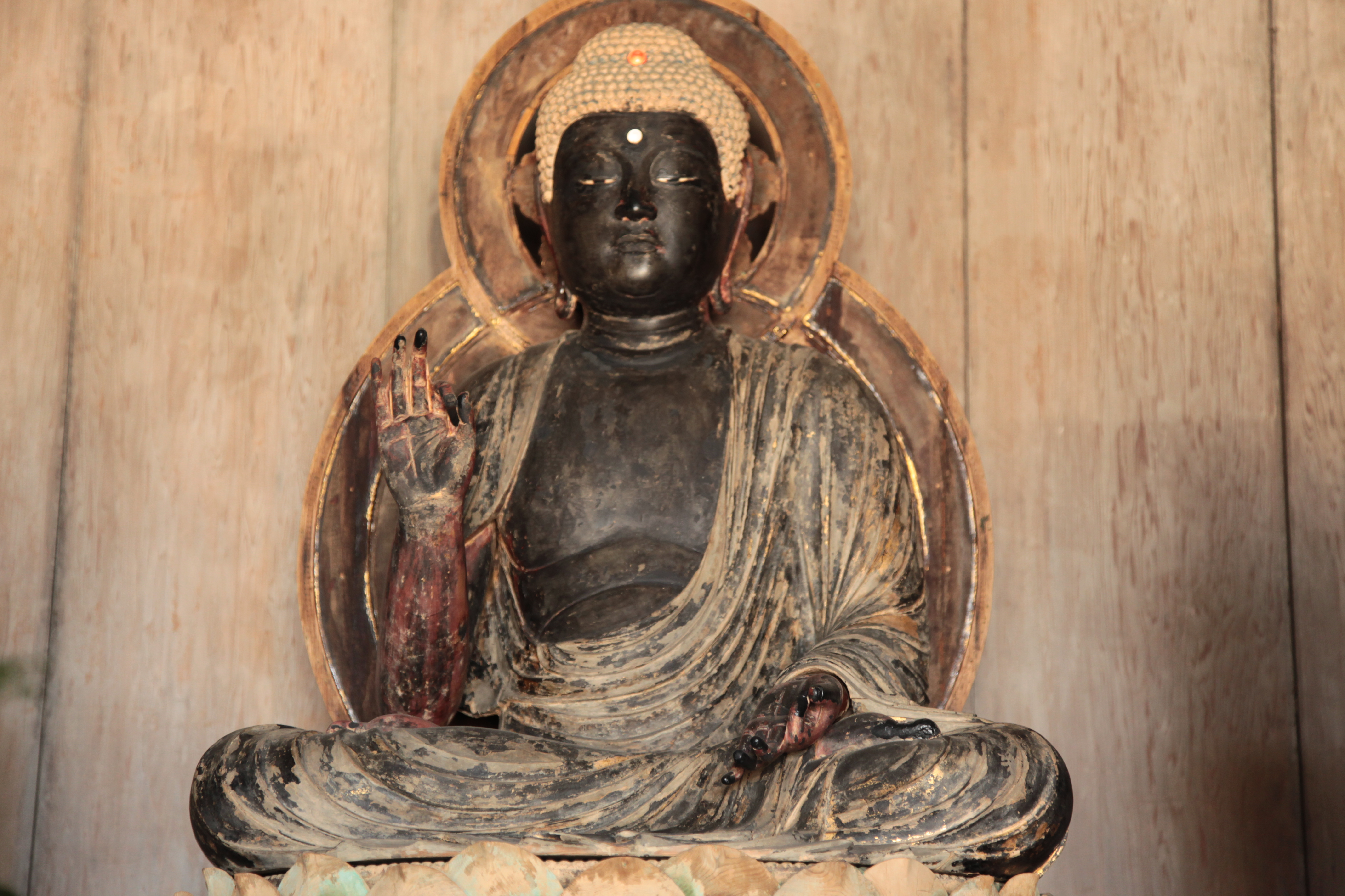 金蓮寺阿弥陀如来（愛知県西尾市）